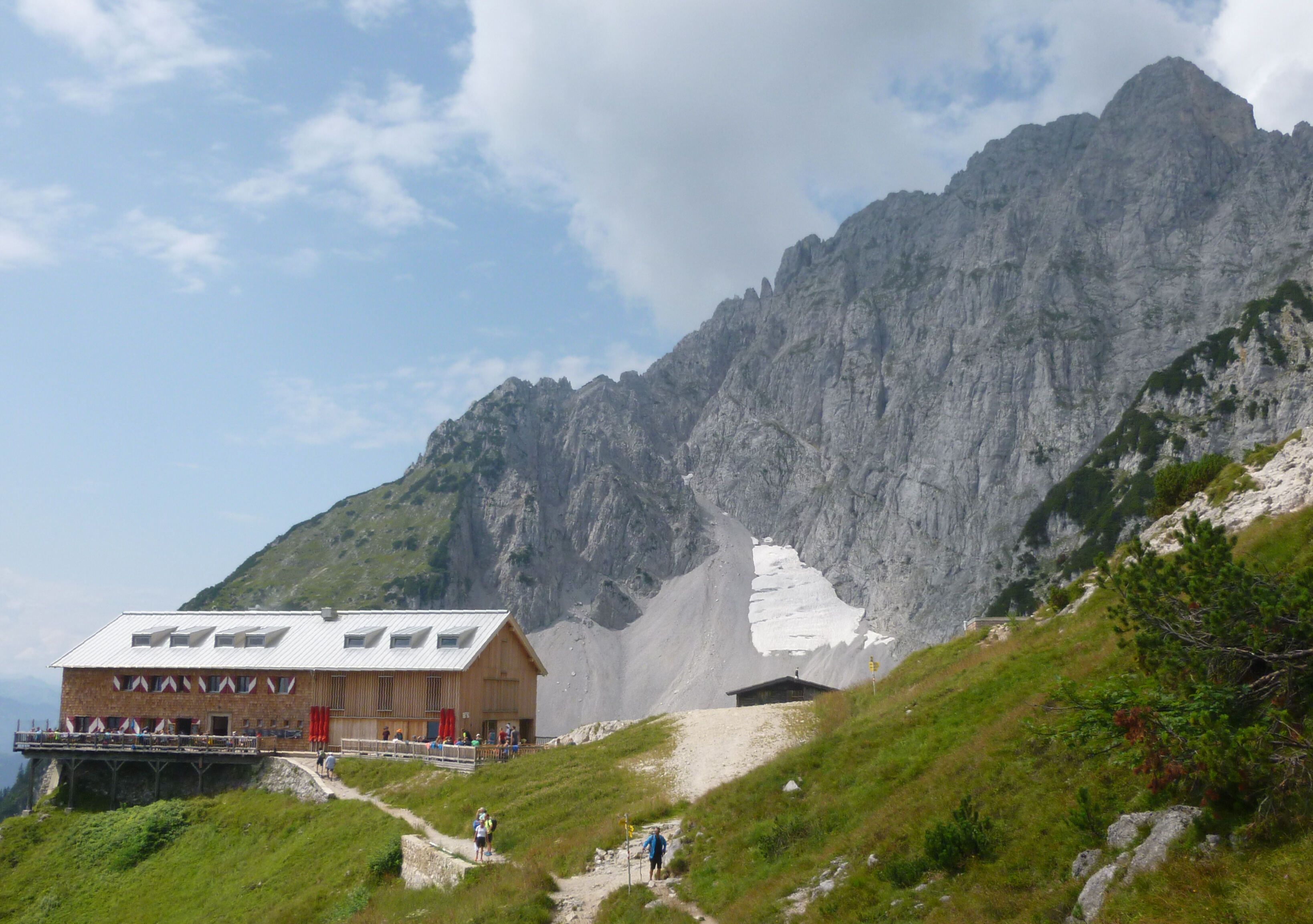 Gruttenhütte